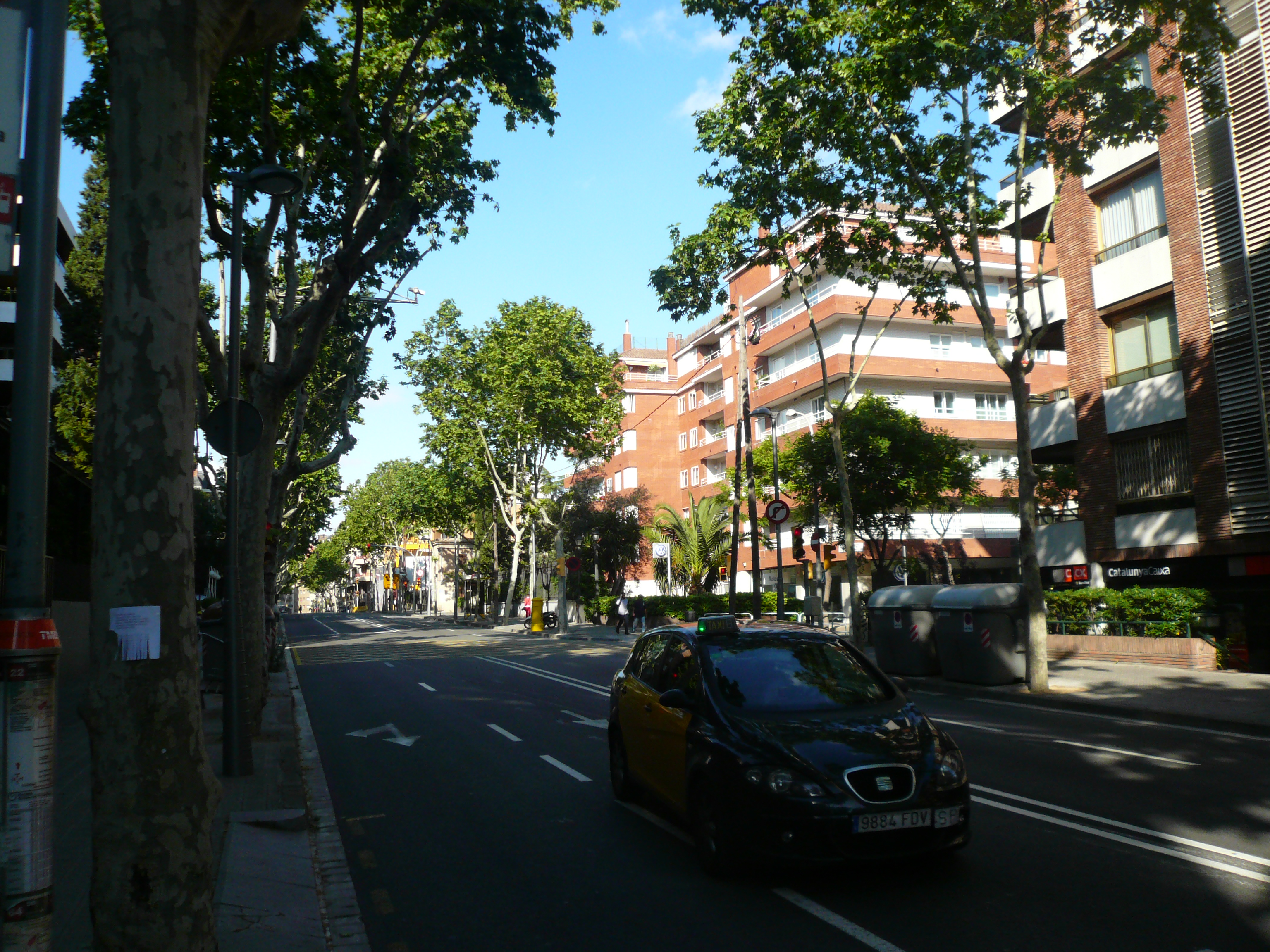 Passeig de la Bonanova, a l'alçada del carrer Vilana. La foto és fet mirant en direcció a la plaça de la Bonanova.